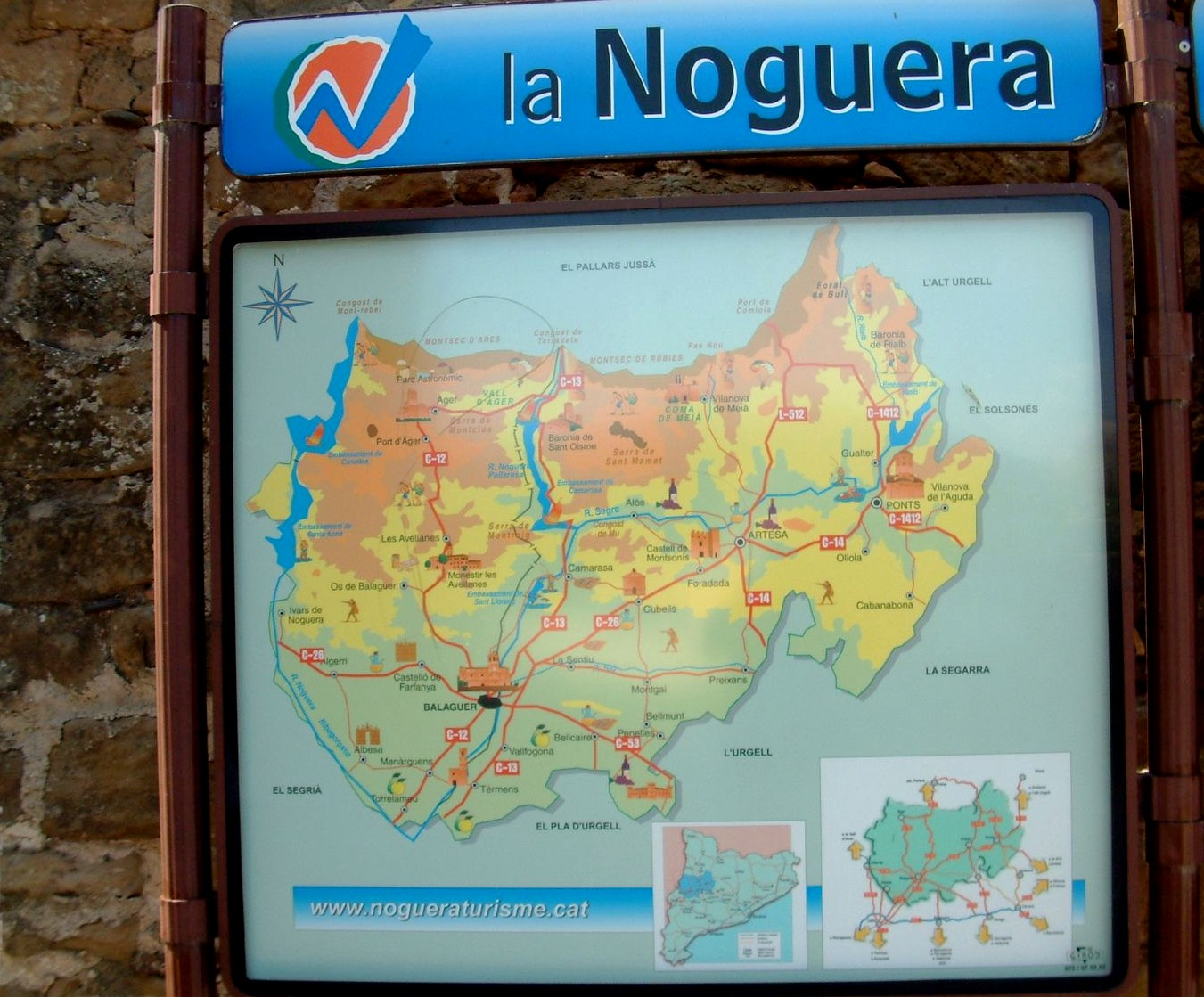 Panel informativo de la comarca catalana de La Noguera.